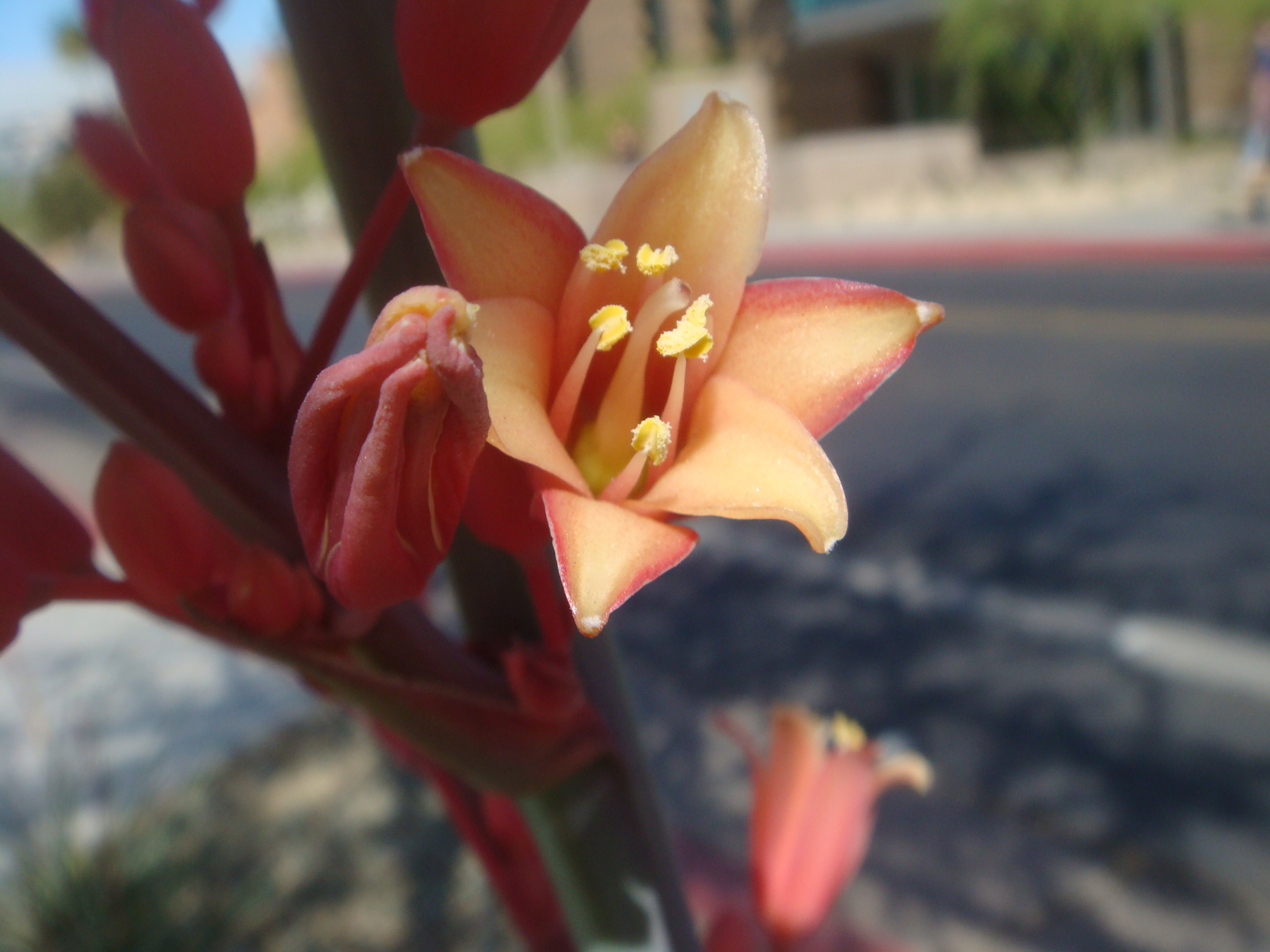 Hesperaloe parviflora, cultivated, Arizona State University, Tempe, Arizona